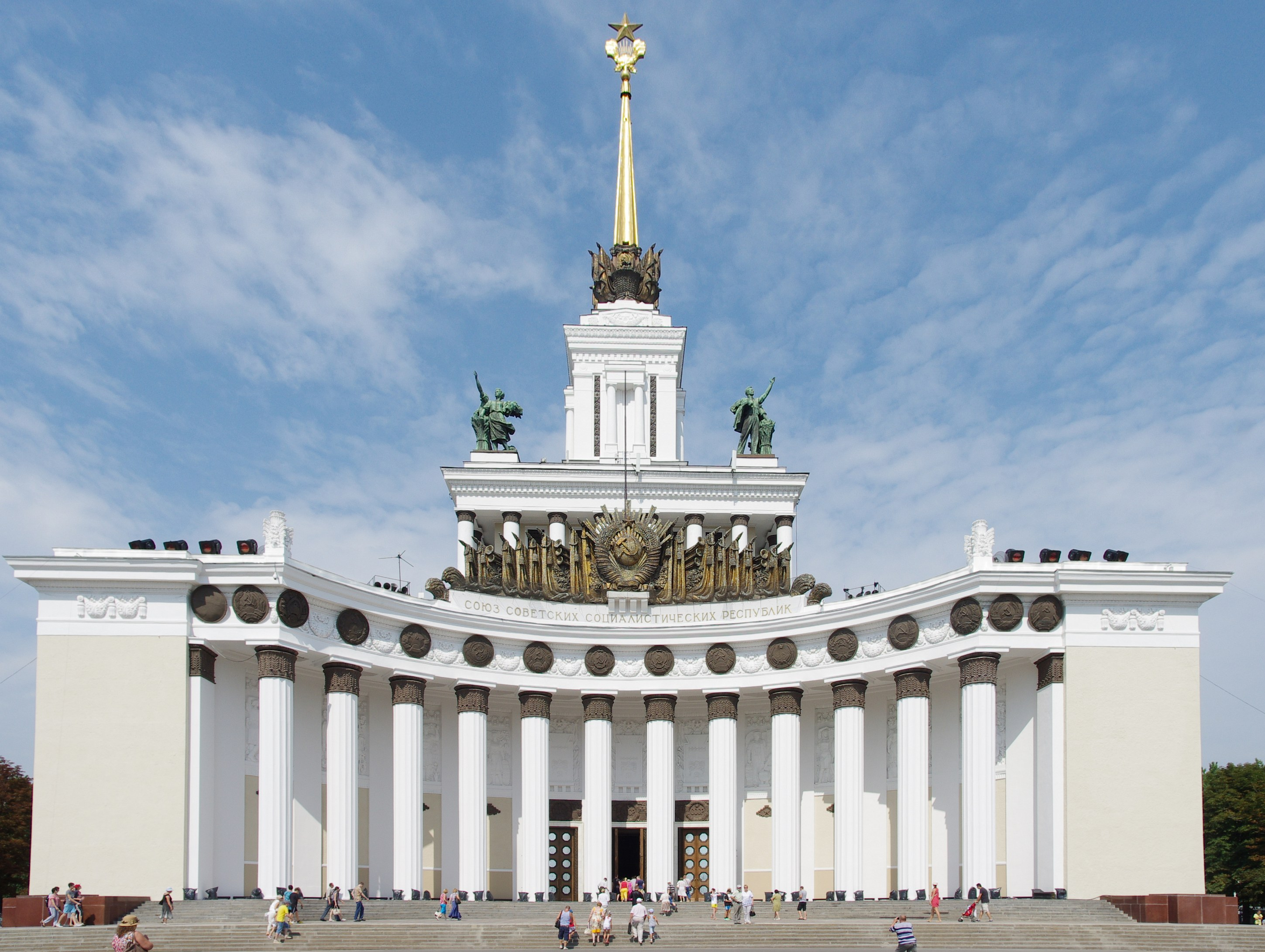 ВДНХ